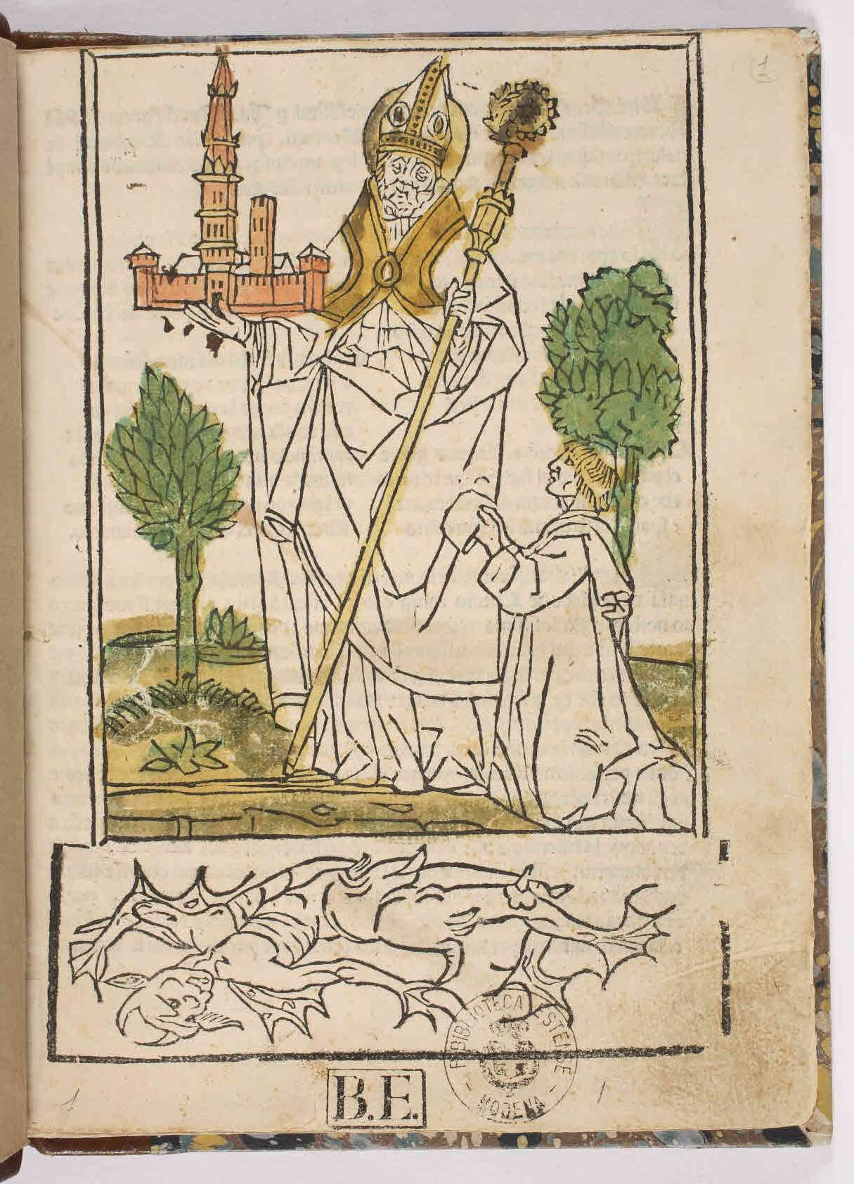 Vita di San Gimignano. - Impressa Mutinae : per Dominicum Rocociolam, Anno Domini millesimo quadringentesimo nonagesimo quinto die undecimo mensis martii. - 16 c. ; a-d⁴ ; 4° .